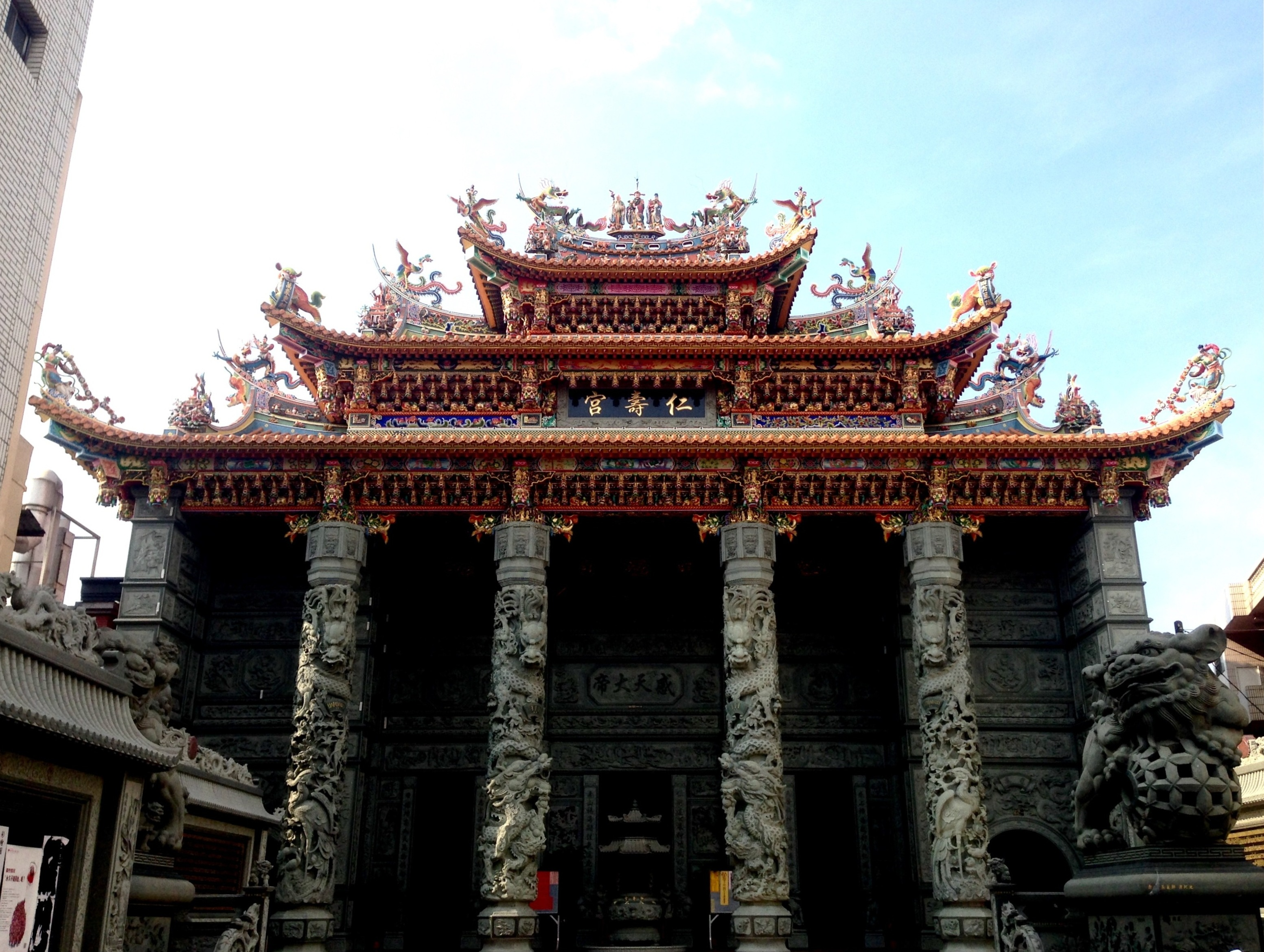 中文（台灣）: 大園仁壽宮